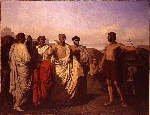 Félix-Joseph Barrias, Cincinnatus recevant les députés du Sénat, 1844, Paris, Ecole Nationale Supérieure des Beaux-Arts